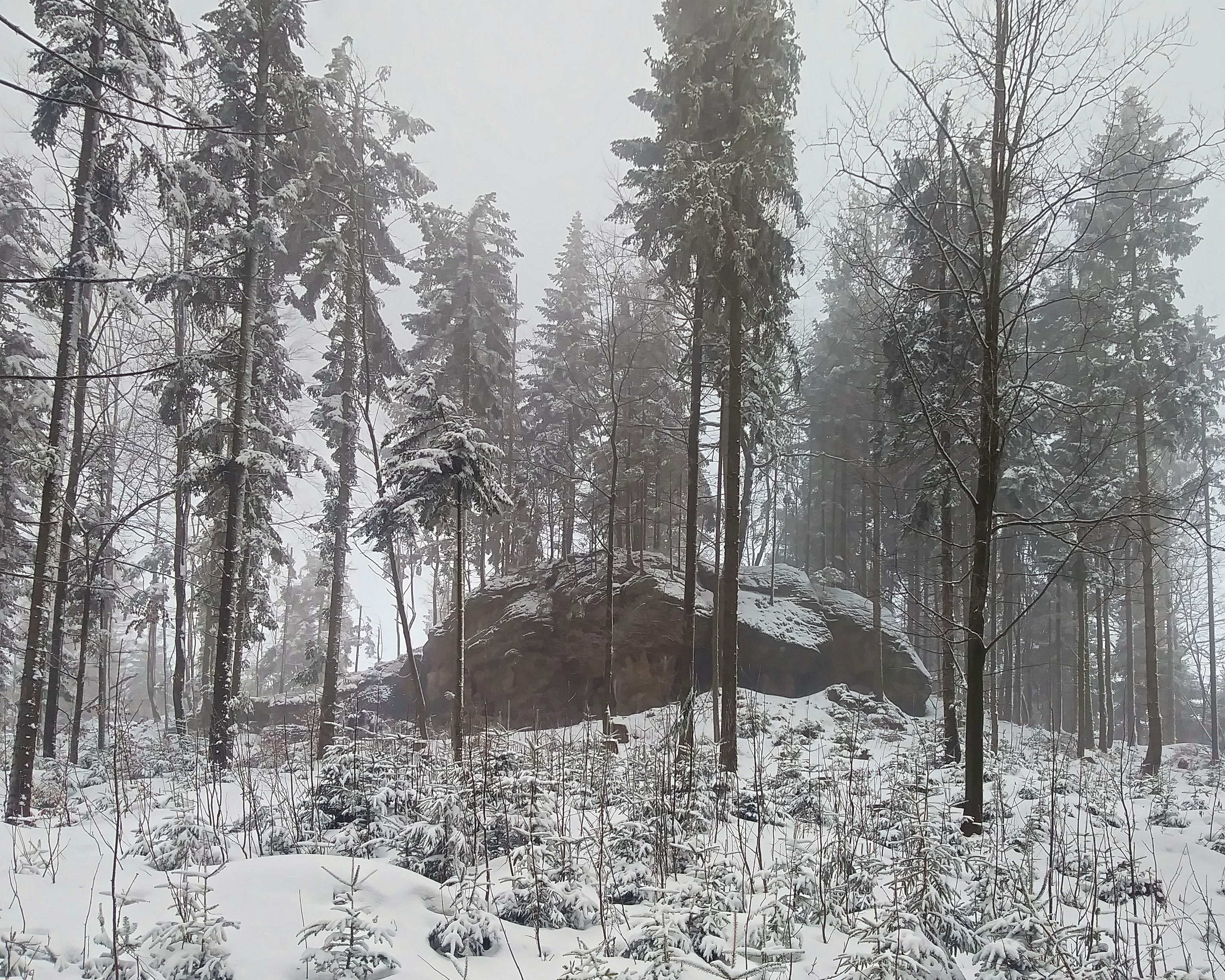 Dorkowa Skała zimą